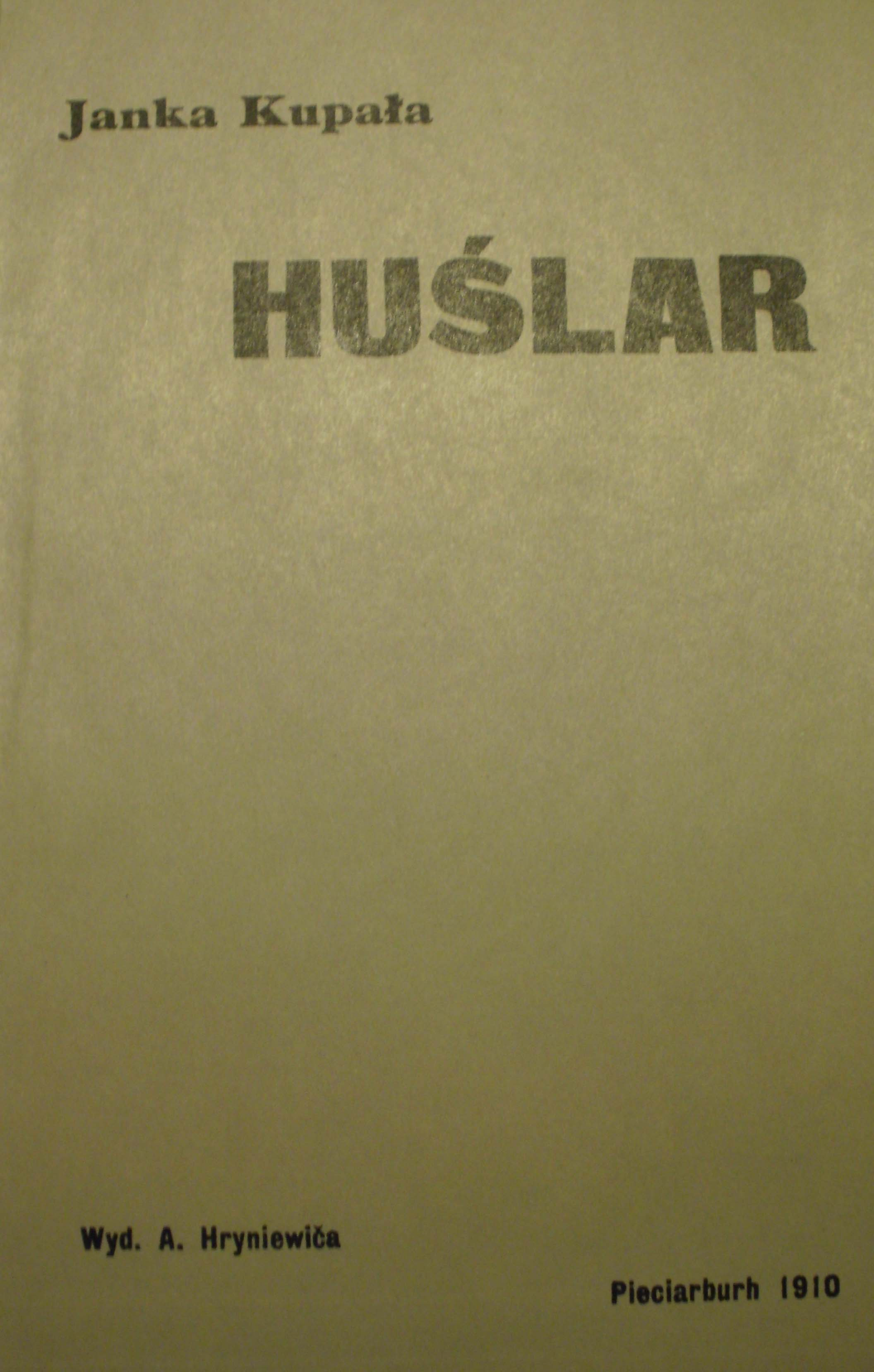 Беларуская (тарашкевіца): Янка Купала - Гусляр, выданне 1910, Пецярбург